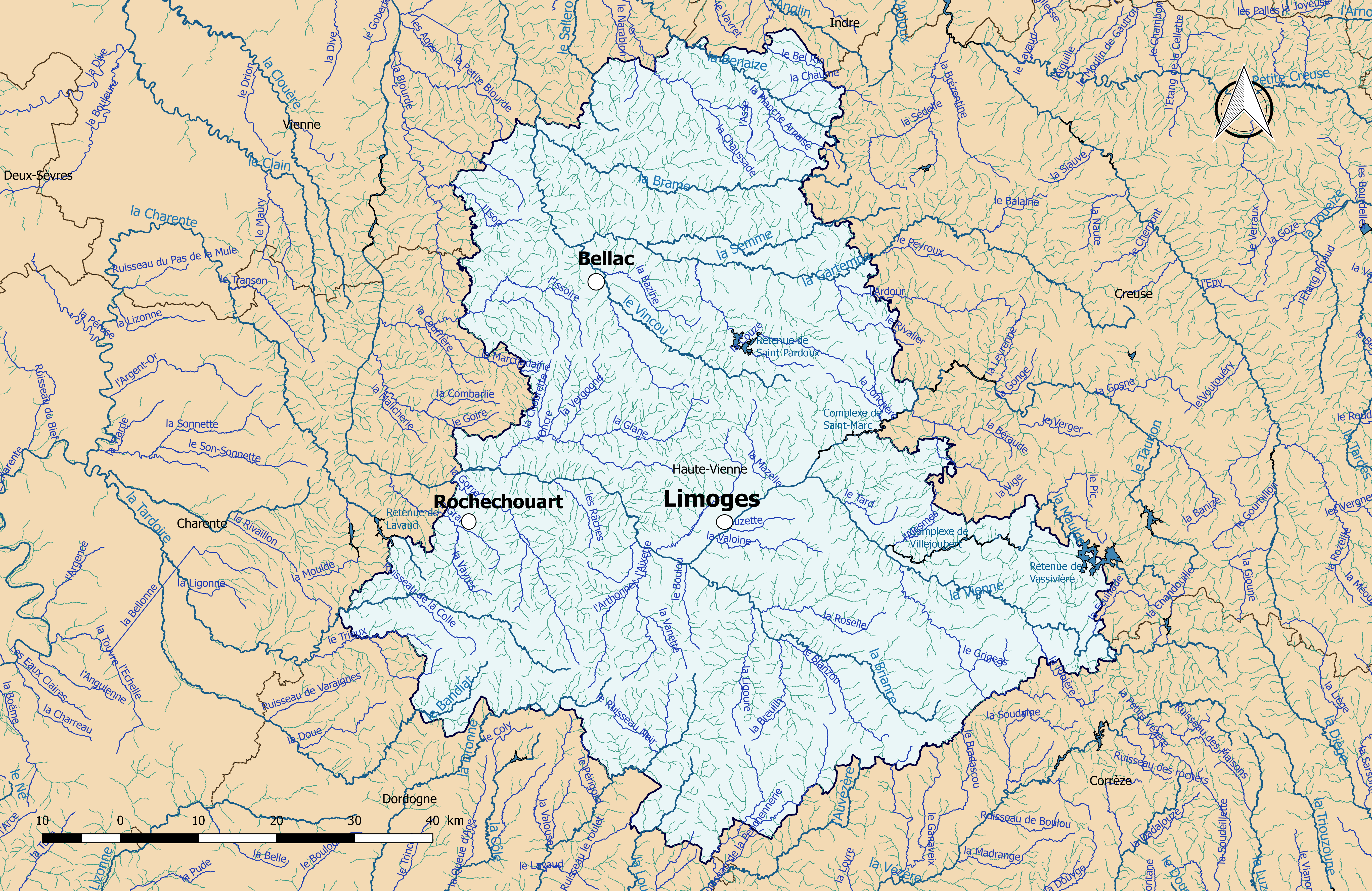 Carte du réseau hydrographique du département de la Haute-Vienne (France).